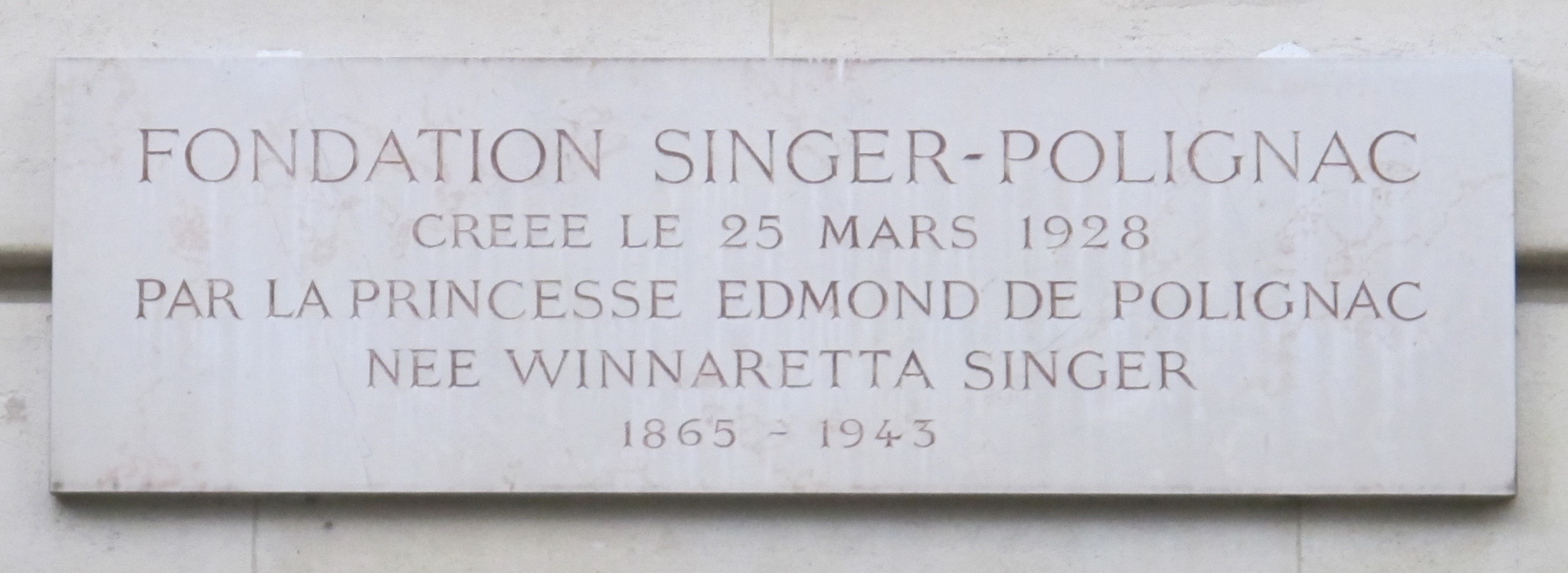 Plaque sur la façade de la fondation Singer-Polignac, 43 avenue Georges-Mandel (Paris, 16e).